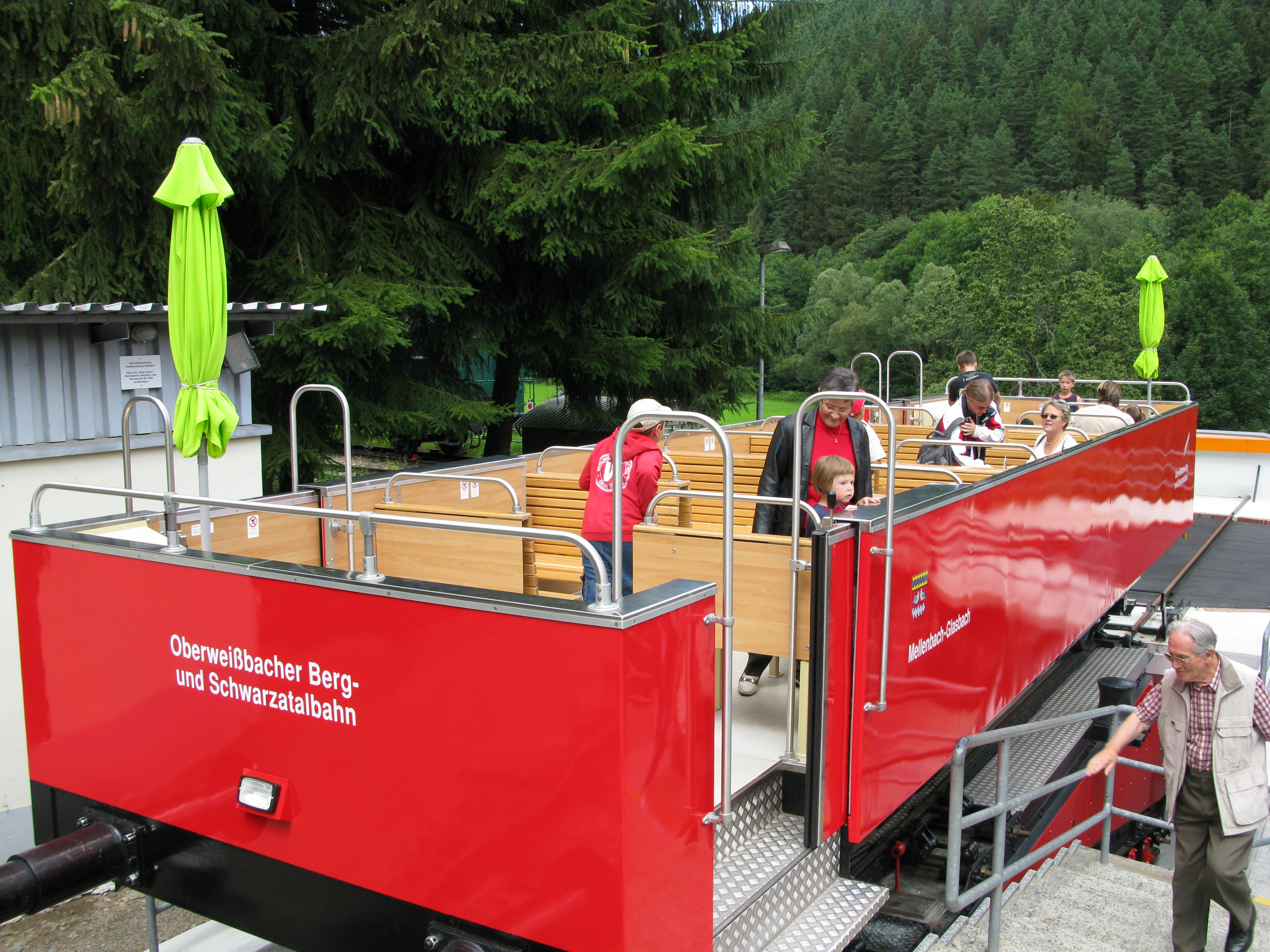 Cabriowagen der Oberweißbacher Bergbahn